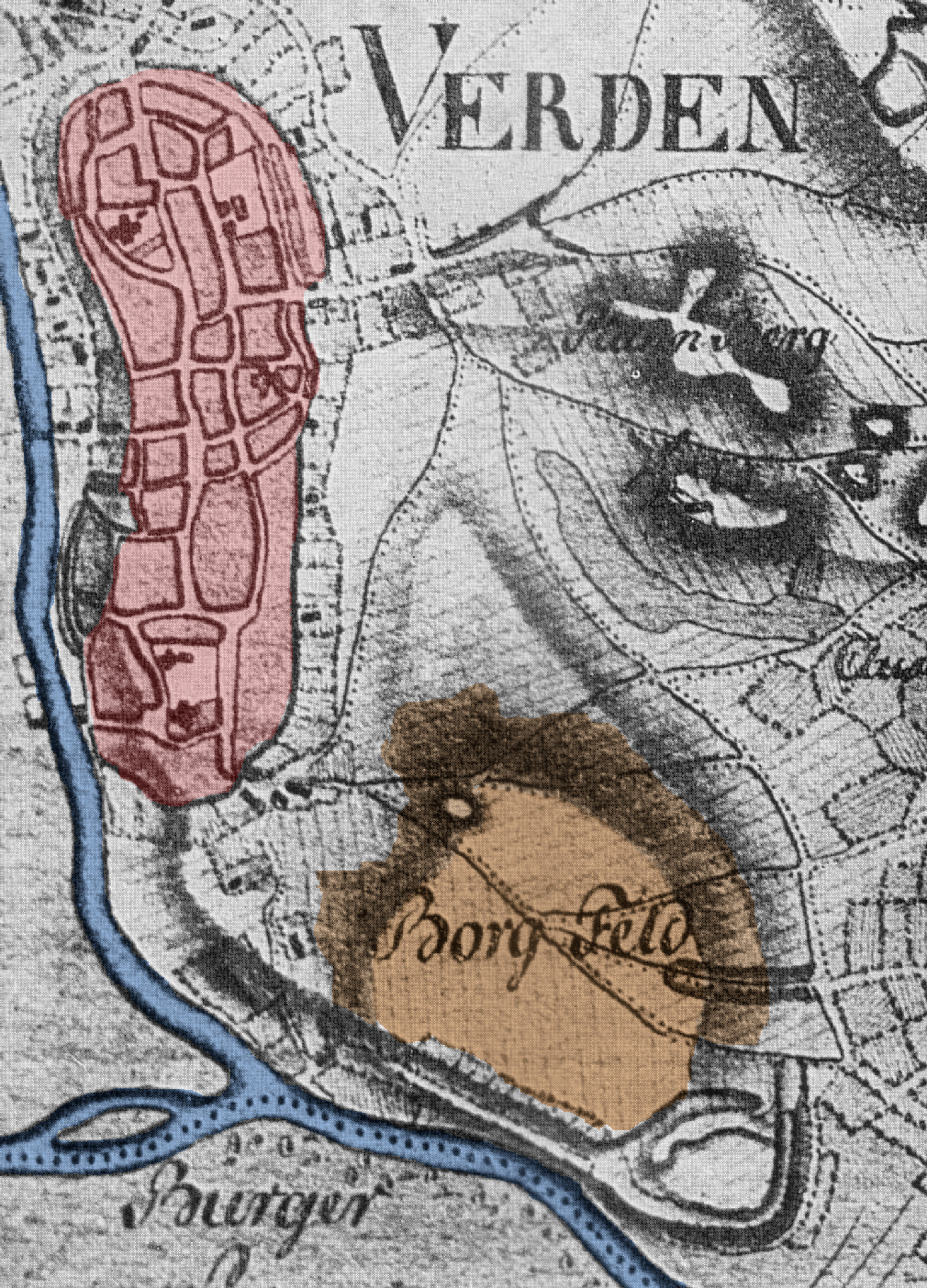 Zeichnung von Verden und der Alten Burg Verden mit Wall auf einer topographischen Landesaufnahme, nachkoloriert